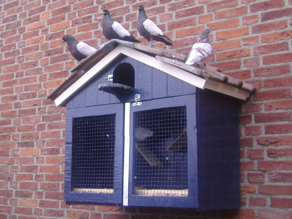 Drei Hyazinthtauben